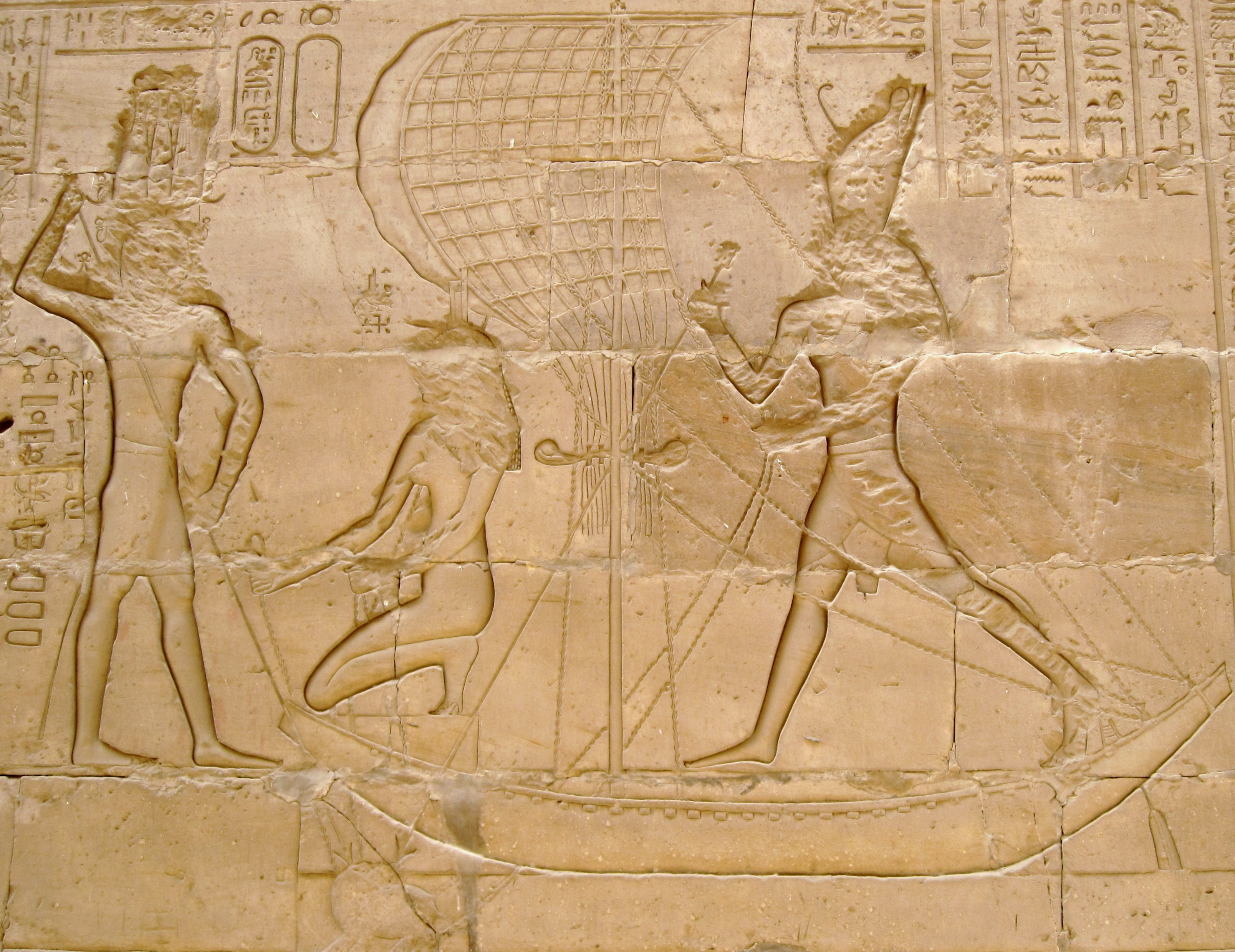 Relief an der Umfassungsmauer im äußeren Korridor des Tempels von Edfu, Ägypten